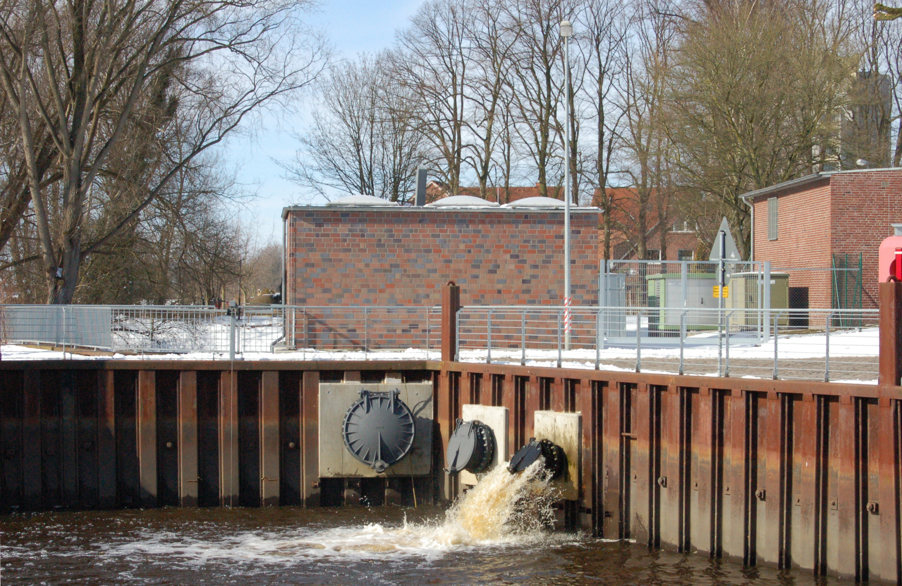 Das Regenwasser Pumpwerk am Stichhafen in Uetersen